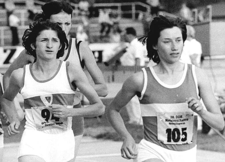 Gaby Meinel, Waltraud Strozer ADN-ZB Häßler -30-6-77-Bau Dresden: DDR-Leichtathletik-Meisterschaften-1.Tag- Den ersten Meistertitel über 3000 m erkämpfte sich die DDR-Rekordhalterin Gaby Meinel (r.) vom SC Cottbus mit 8:57,9 min. vor Waltraud Strozer (l.) vom SC Motor Jena.